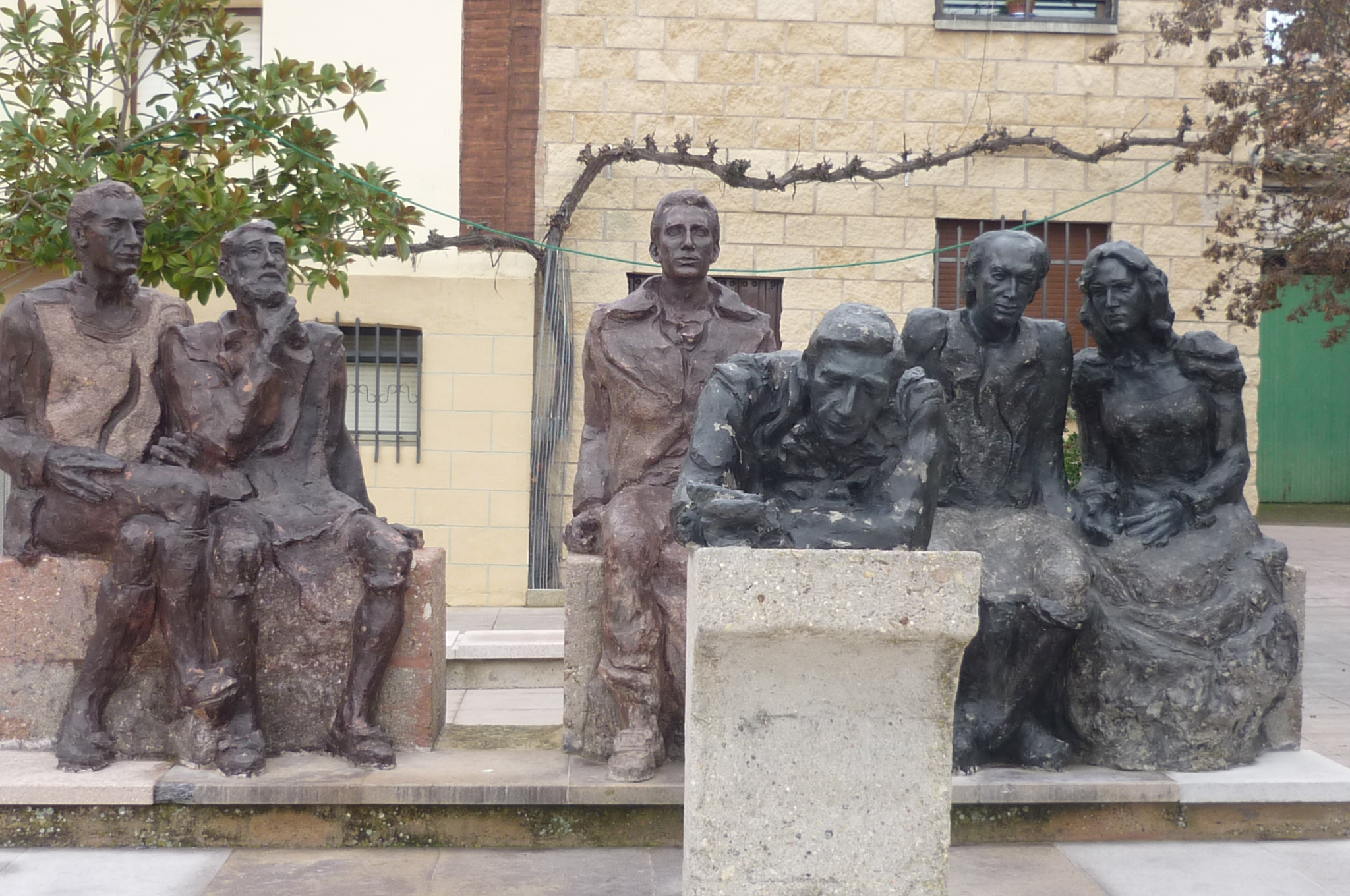 Monumento conmemorativo a la convención preautonómica de Santa Coloma (La Rioja, España) de 1812.